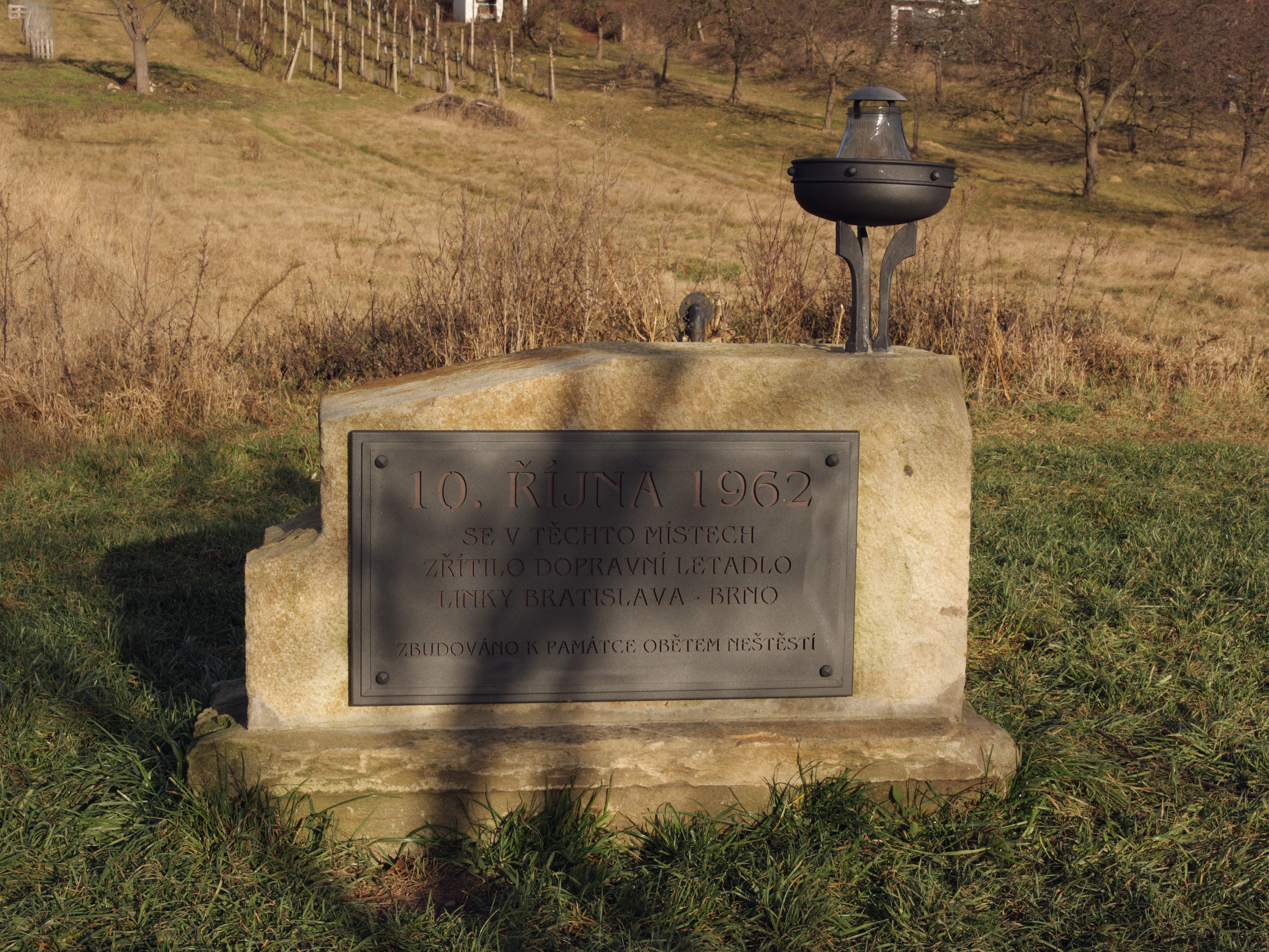 Újezd u Brna - pomník leteckého neštěstí pod Starou horou. Letoun ČSA Avia Av-14 (Il-14M) letěl ve středu 10. října 1962 na pravidelné lince OK 306 Košice-Bratislava-Brno-Praha. V 8:57 hod., v mlze, při nestandardním přiblížení na dráhu 28, narazil stroj OK-MCT pravým křídlem do úbočí kopce. Po nárazu se rozlomil a vznítil. Zahynulo 10 z 38 cestujících a 3 ze 4 členů posádky.